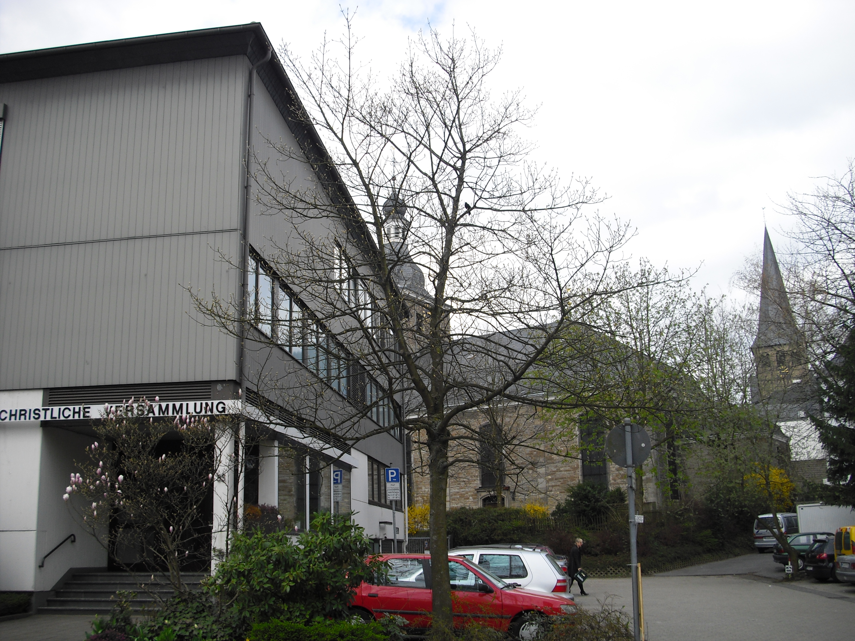 Christliche Versammlung in Mettmann, im Hintergrund die Evangelische Kirche Mettmann, rechts der Turm der katholischen Kirche St. Lambertus